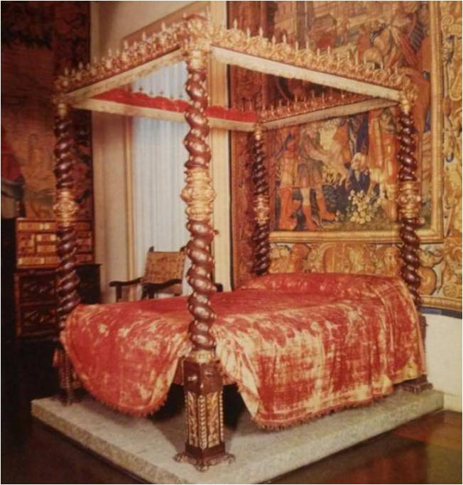 Llit